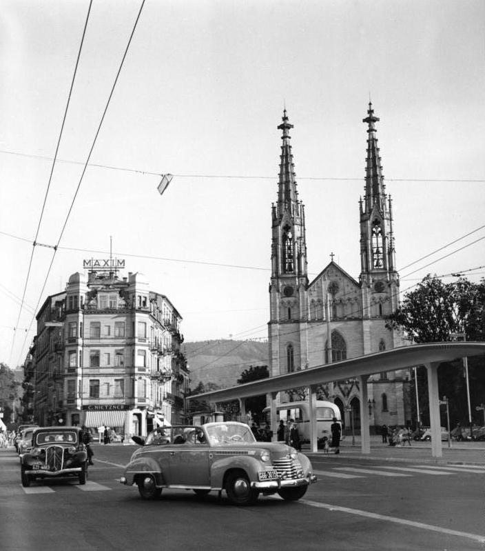 7.-8.8.1953 Baden-Baden der Augustaplatz und die Evangelische Stadtkirche